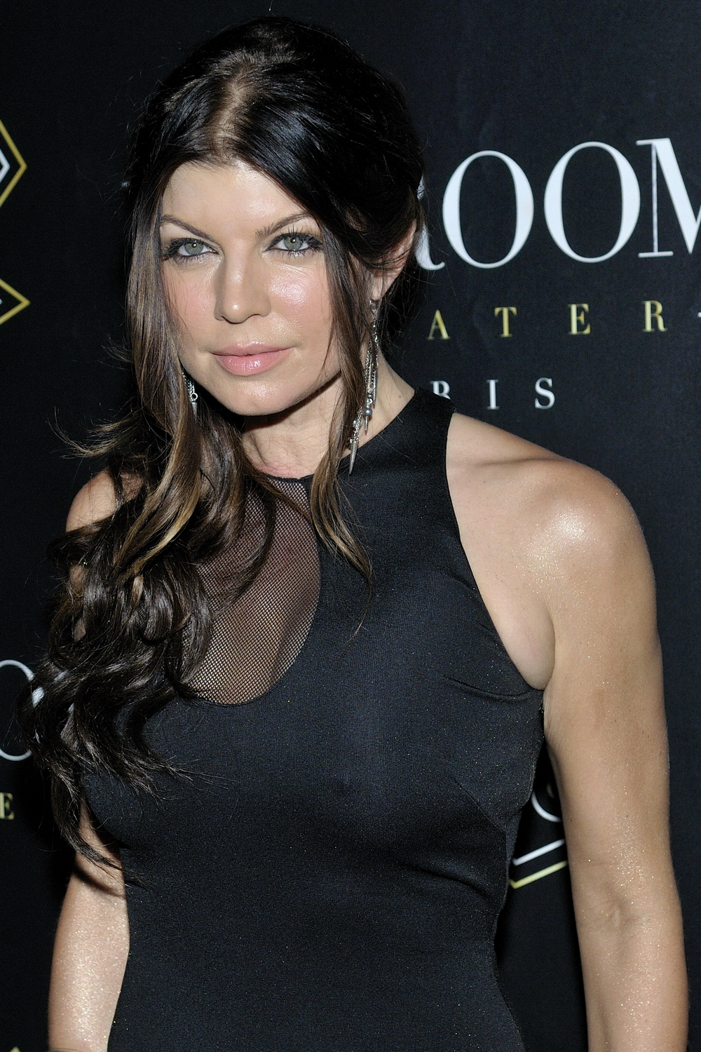 Fergie Les Black Eyed Peas en concert privé au VIP Room Paris. avec will.i.am, apl.de.ap, Taboo et Fergie Taken in Palais-Royal, Paris